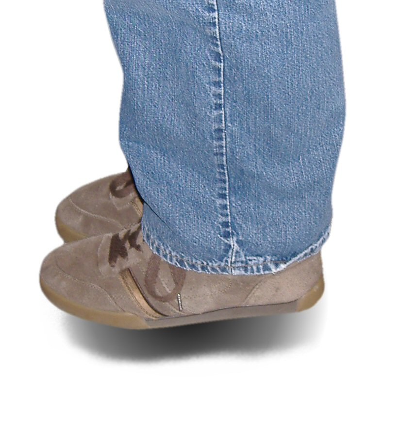 King Rising Levitation Lewitacja King Rising